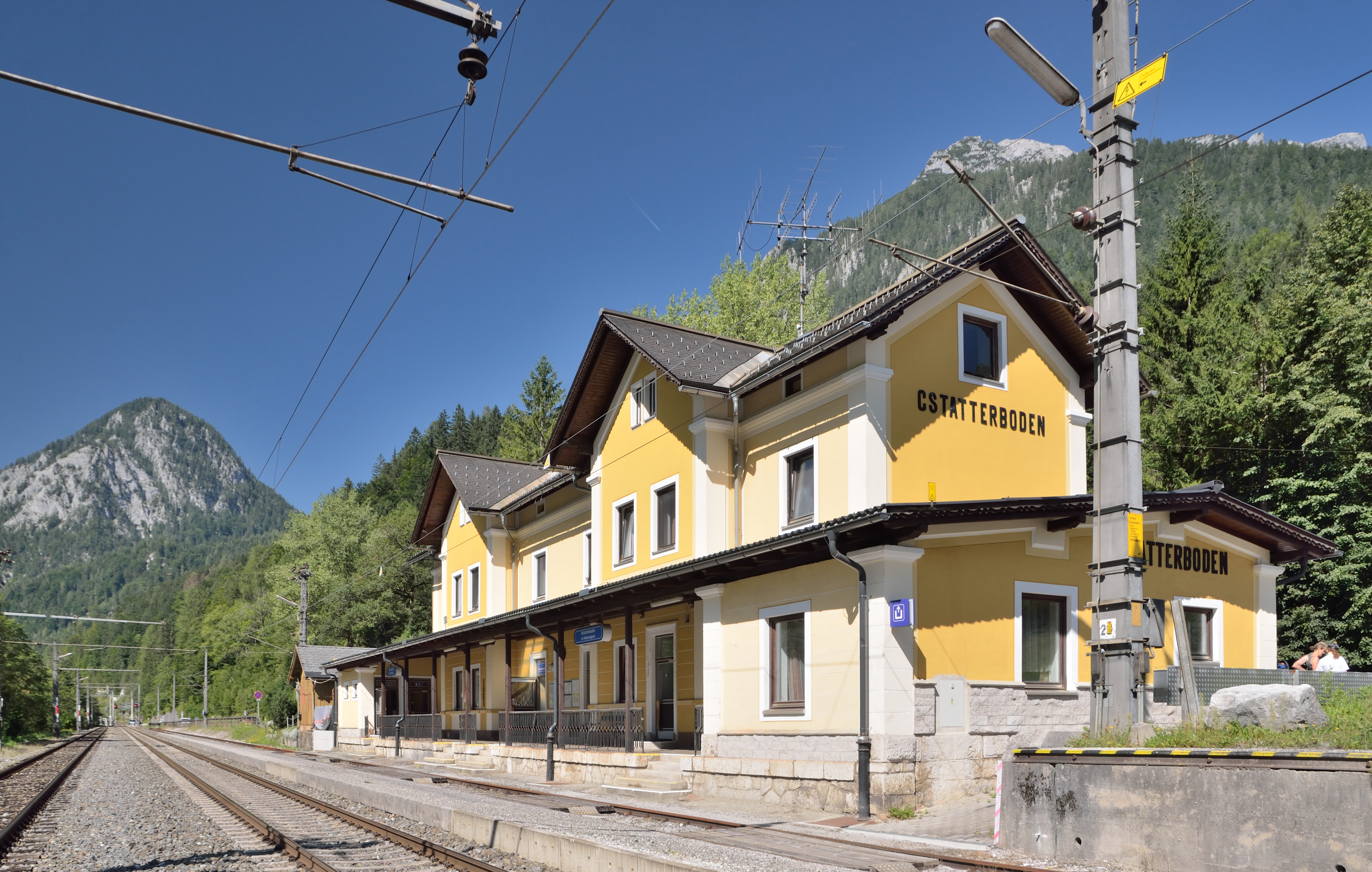 Der Bahnhof Gstatterboden in Gstatterboden, Gemeinde Admont, bis 2014 Johnsbach.